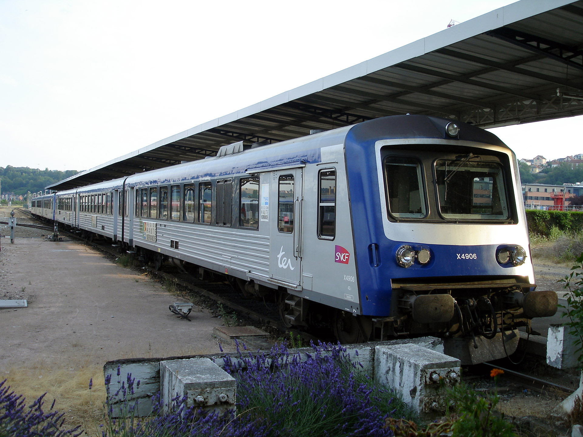 La gare de Dieppe, Seine-Maritime, France.